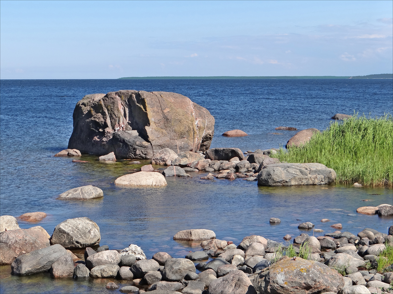 Mustkivi (ka Mustikivi), Viinistu